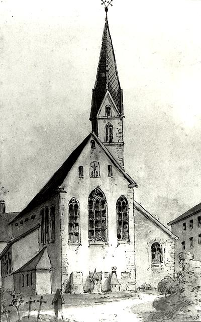 Das ehemalige Chorherrenstift St. Johann in Konstanz. Federzeichnung von 1832.